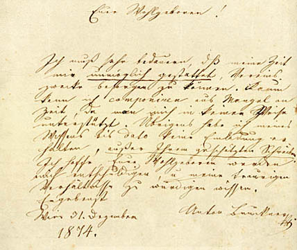 Brief an Julius Gatnar, Professor am Pädagogium in Linz. Erworben durch Konrad Schiffmann, den "Gründungsvater" der Studienbibliothek und Erbauer des Gebäudes am Linzer Schillerplatz